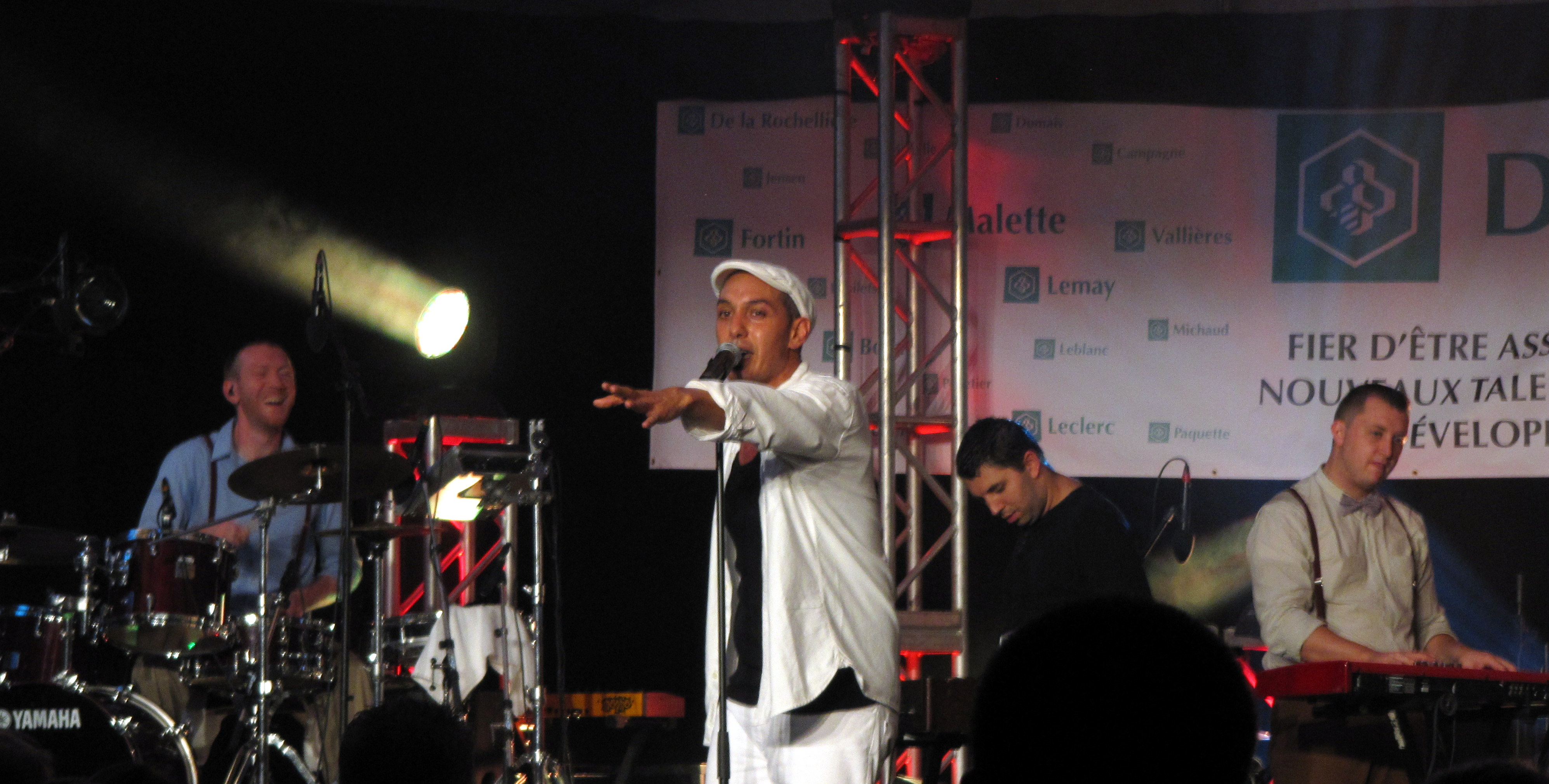 Spectacle de HK et les Saltimbanks au Festival international de la chanson de Granby 2012, place Johnson, aux chapiteaux Desjardins.